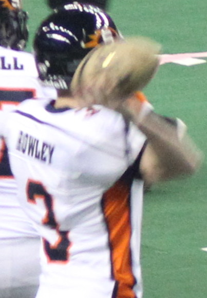 Spokane Shock vs. Utah Blaze